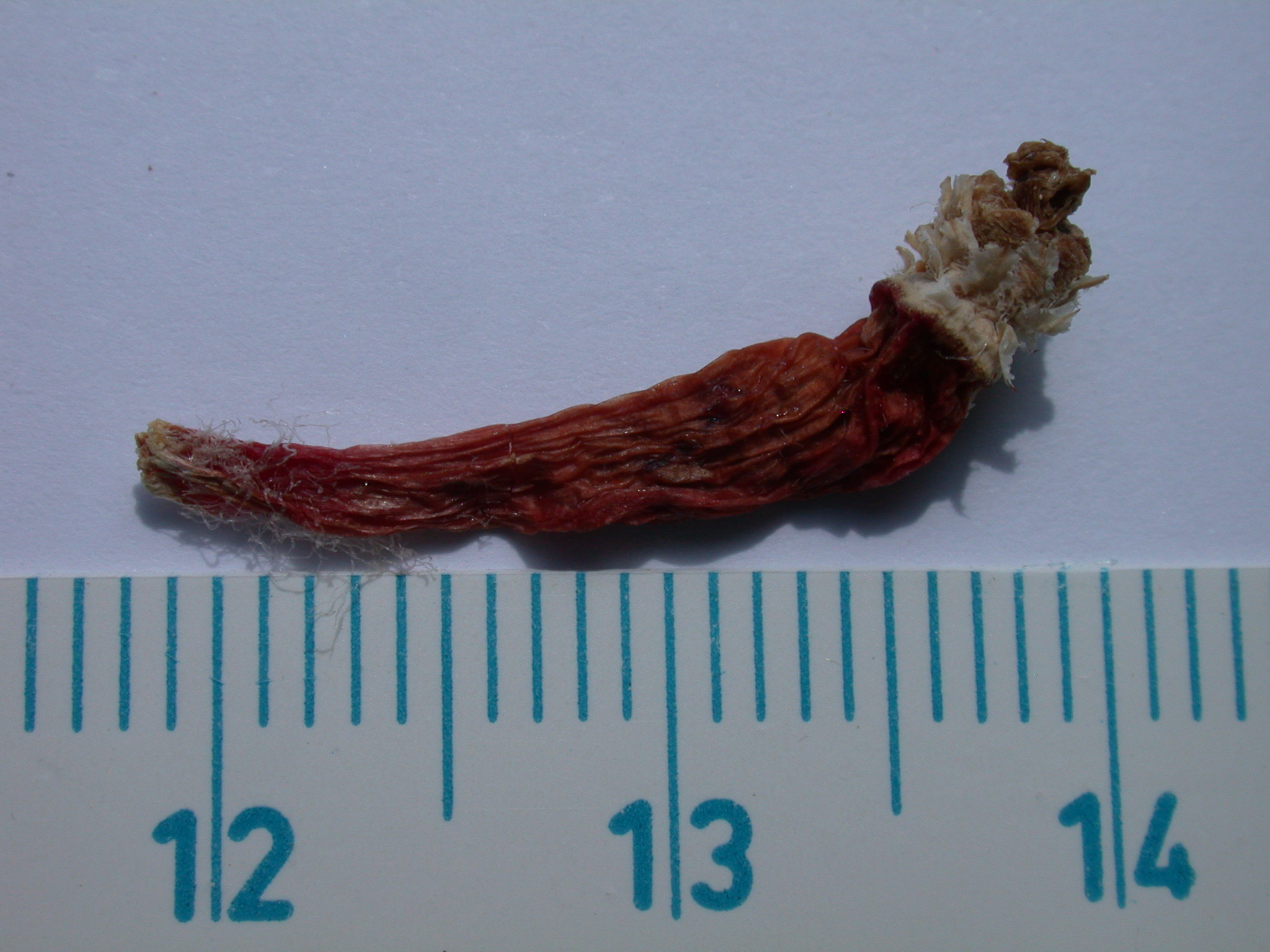 Plod Mammillaria miegiana. Praha, Česká republika.